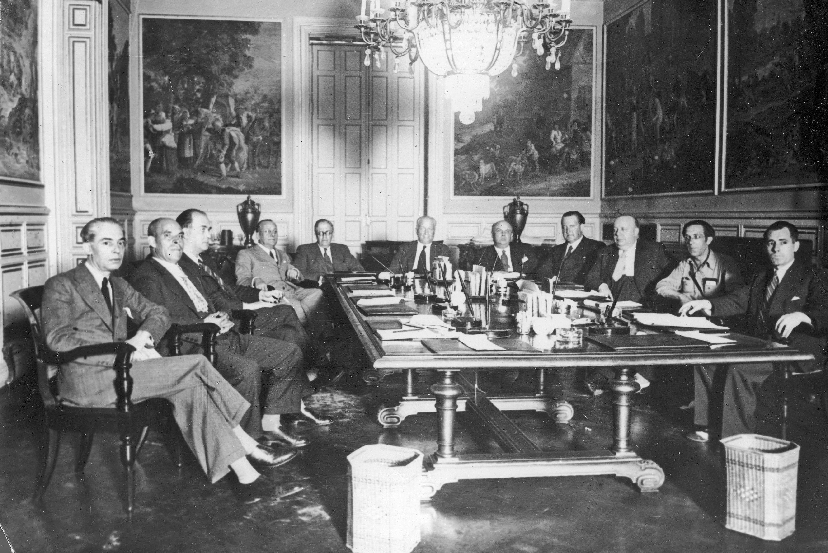 El primer gobierno Largo Caballero. De izquierda a derecha aparecen: Bernardo Giner de los Ríos, ministro de Comunicaciones. Anastasio de Gracia, ministro de Industria y Comercio. Juan Negrín, ministro de Hacienda. José Giral, ministro sin cartera. Julio Álvarez del Vayo, ministro de Estado. Francisco Largo Caballero, Presidente y ministro de la Guerra. Mariano Ruiz-Funes, ministro de Justicia. Ángel Galarza, ministro de la Gobernación. Indalecio Prieto, ministro de Marina y Aire. Jesús Hernández, ministro de Instrucción pública. Vicente Uribe, ministro de Agricultura.